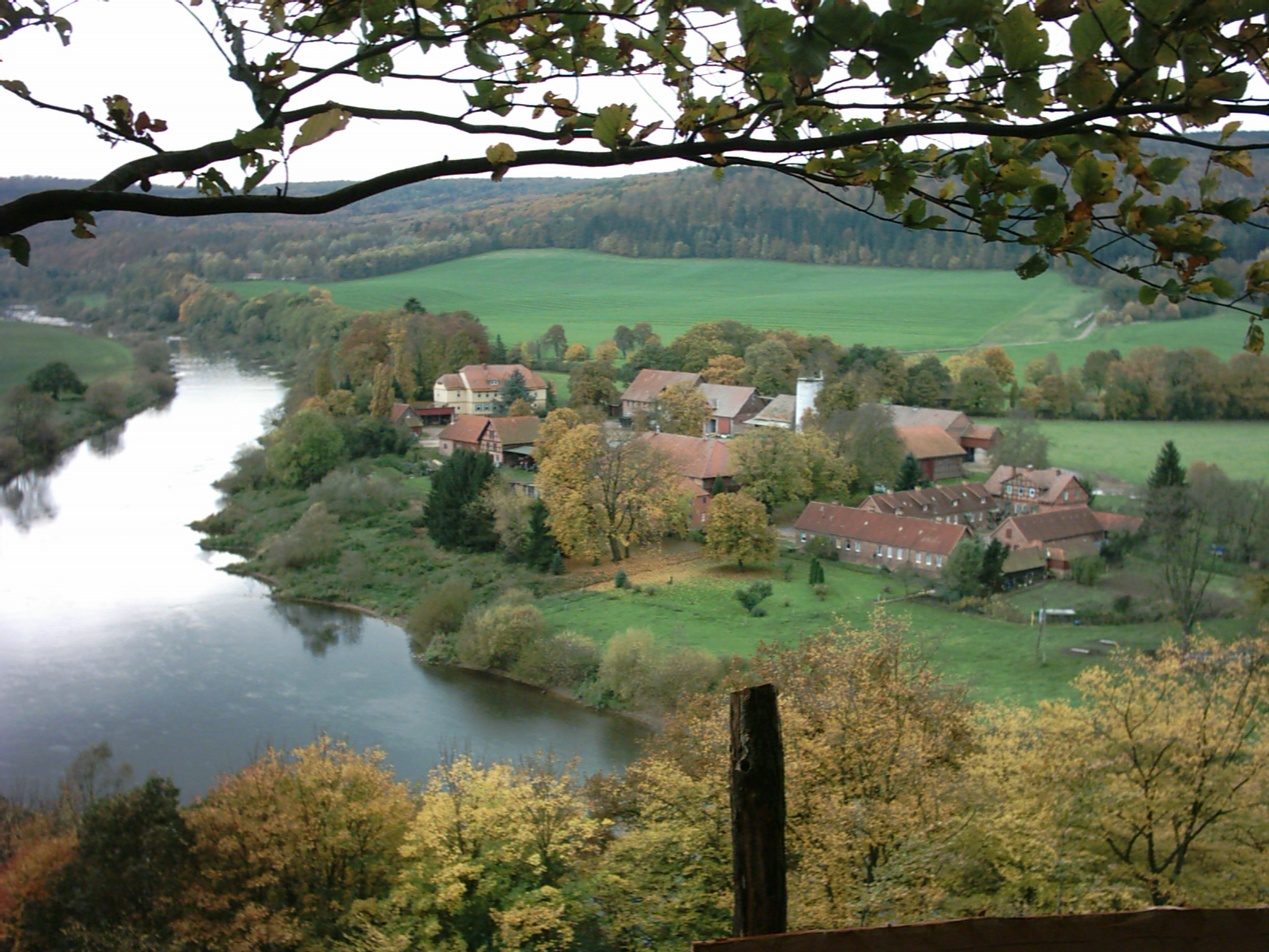 Hilwartshausen an der Weser - selbst fotografiert 11/2005 - GNU-FDL